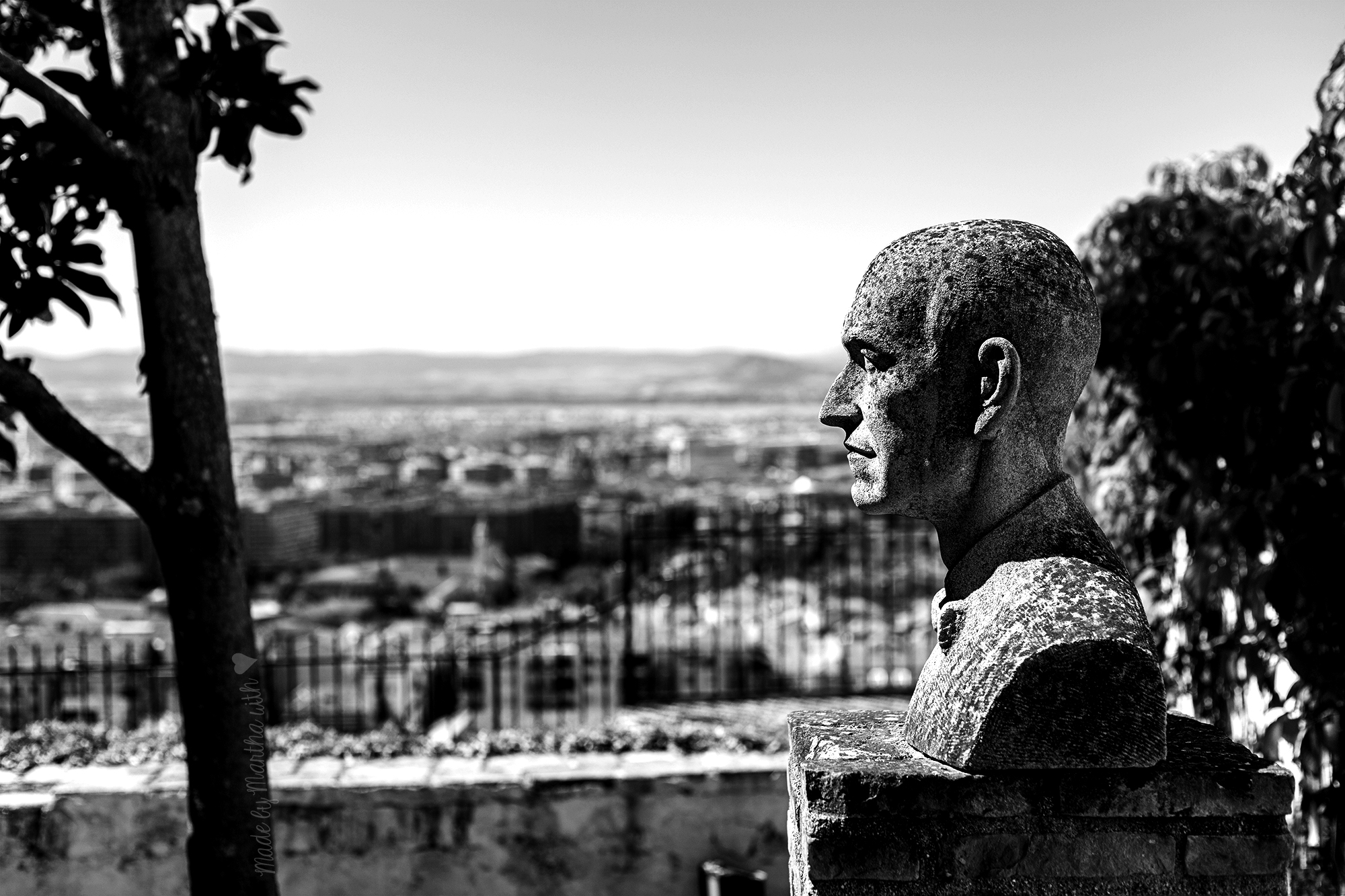 Carmen del Ave María(Casa- Museo Manuel de Falla)